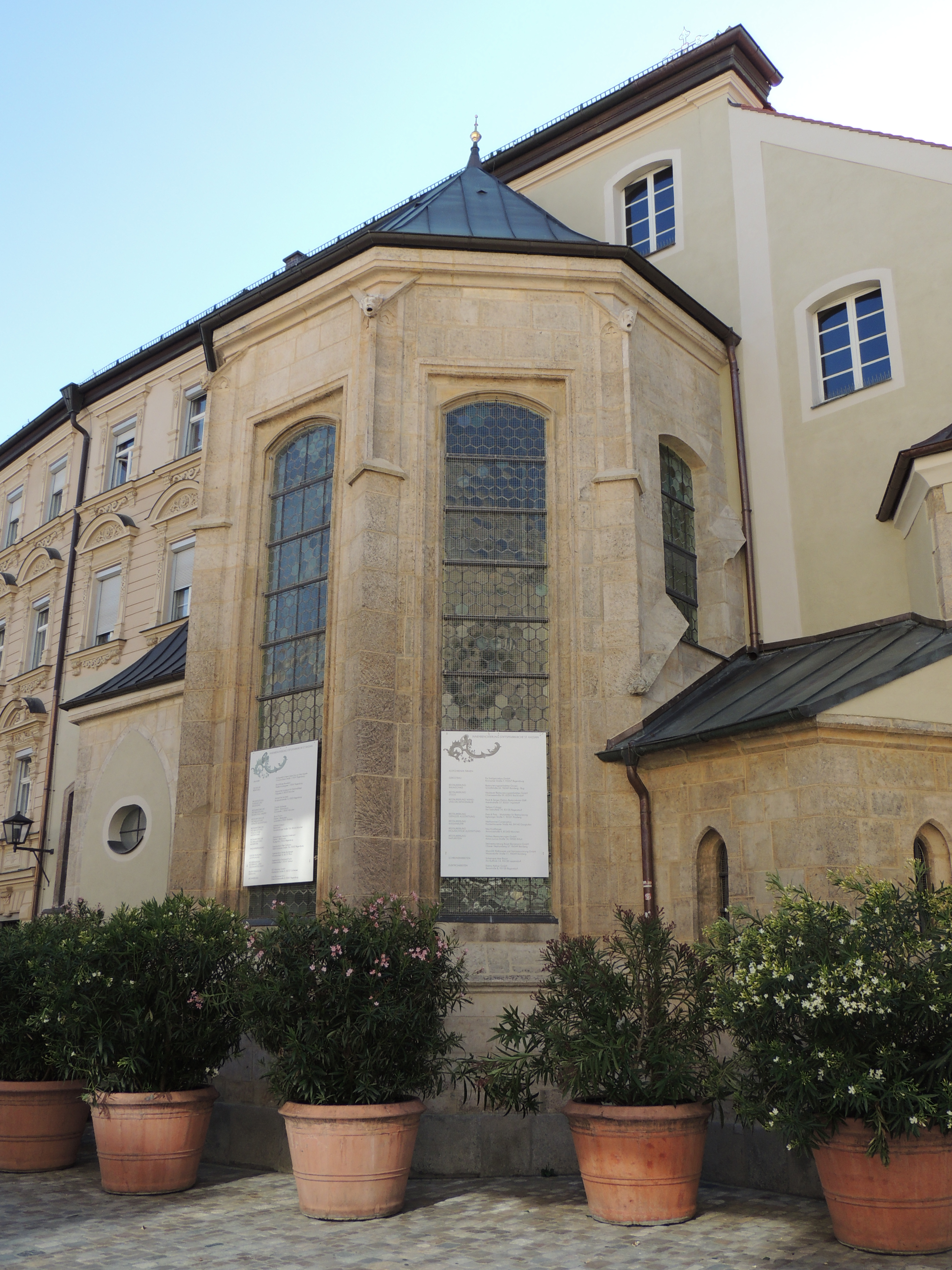 Die Kirche St. Kassian wurde um 880 erbaut. Sie ist die älteste Pfarrkirche Regensburgs. Um 1300 und 1477 wurde sie erweitert und umgebaut, von 1749 bis 1760 erfolgte eine Rokoko-Umgestaltung. D-3-62-000-1020This is a photograph of an architectural monument.